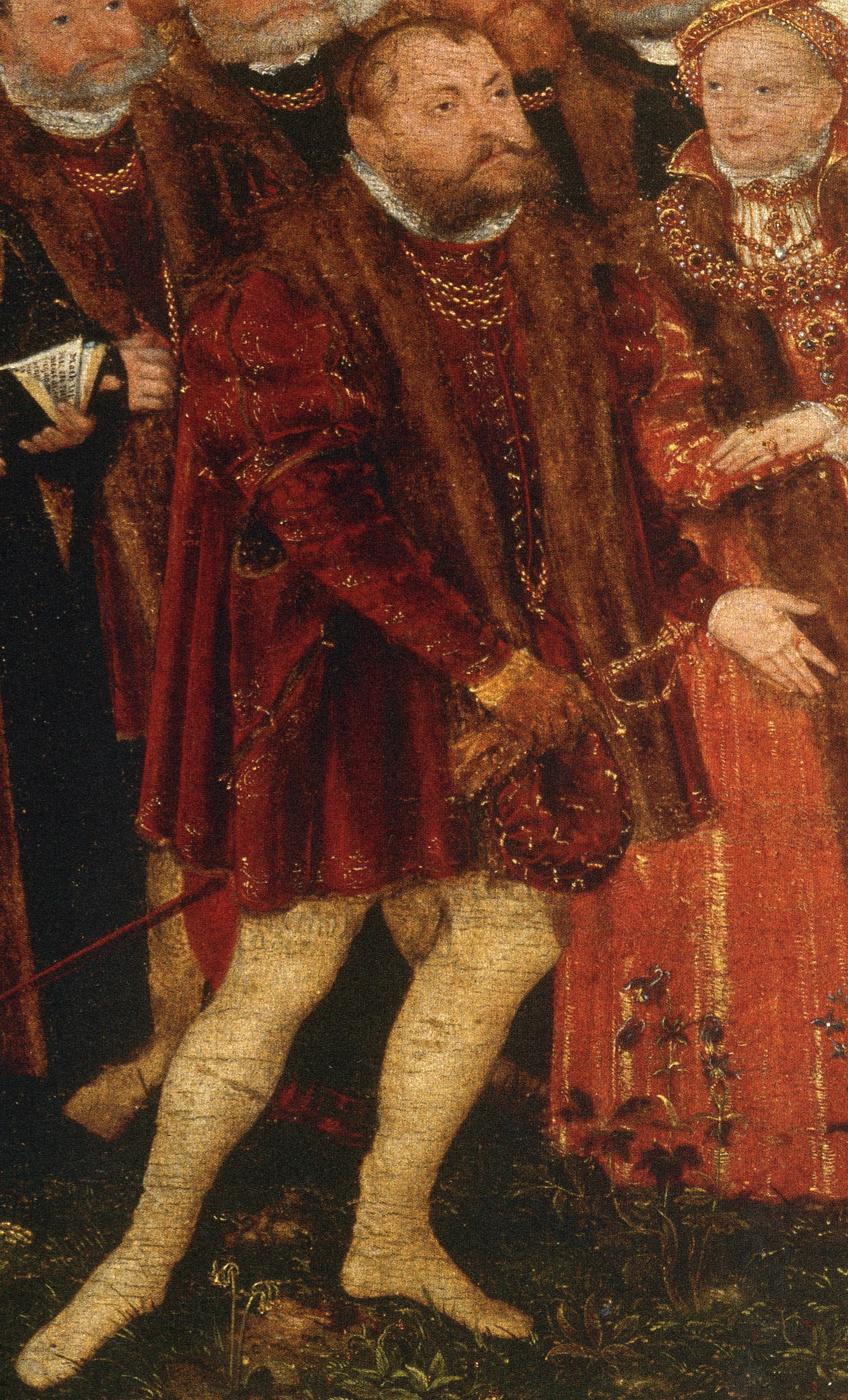 Ausschnitt mit dem Porträt Johann von Brandenburg-Küstrin, der als Brautführer seine Schwester Magarete zur Vermählung mit dem Fürsten Johann IV. von Anhalt-Zerbst nach Dessau begleitet.